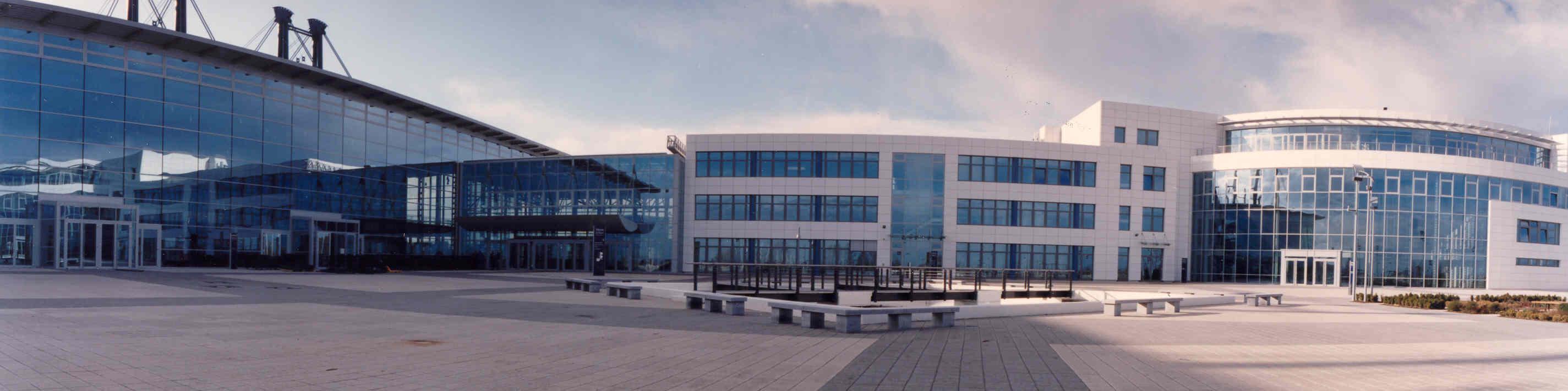 Panoramabild der Messe Erfurt